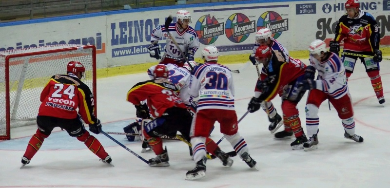 Vaasan Sport vs. TuTo, harjoitusottelu elokuussa -05 Vaasassa